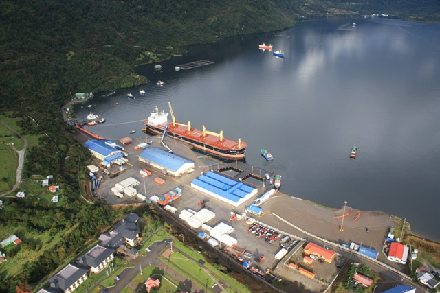 Vista Área del Puerto.